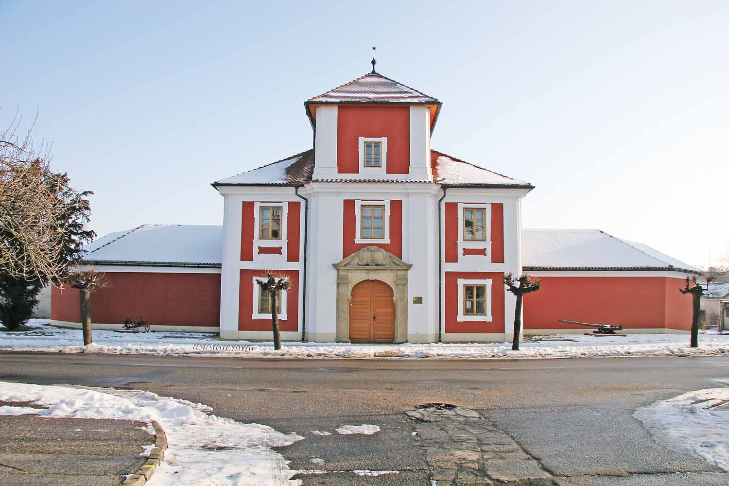 Bývalý klášter Loreta, dnes muzeum zemědělské techniky 19. století v Chlumci nad Cidlinou autor:Zp